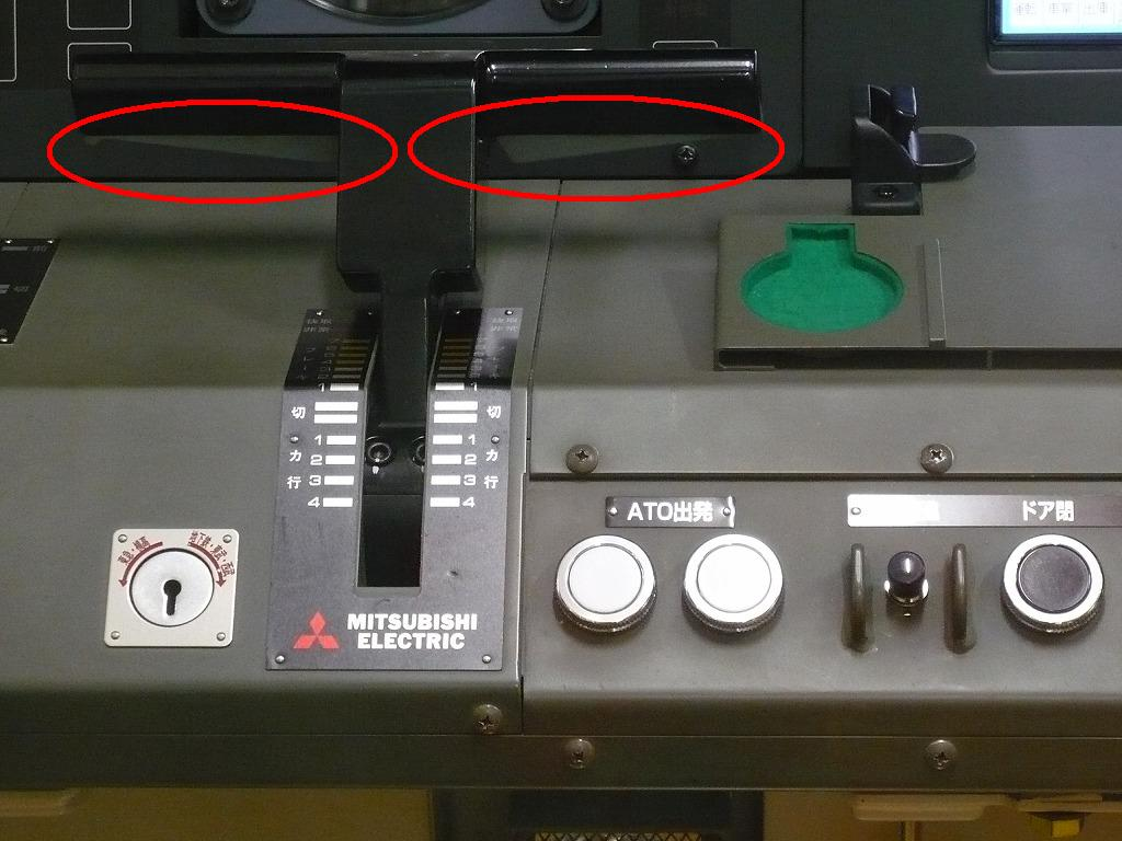 東京地下鉄10000系のマスコン